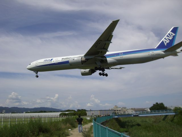 大阪国際空港、滑走路末端（千里川土手）から見る航空機。